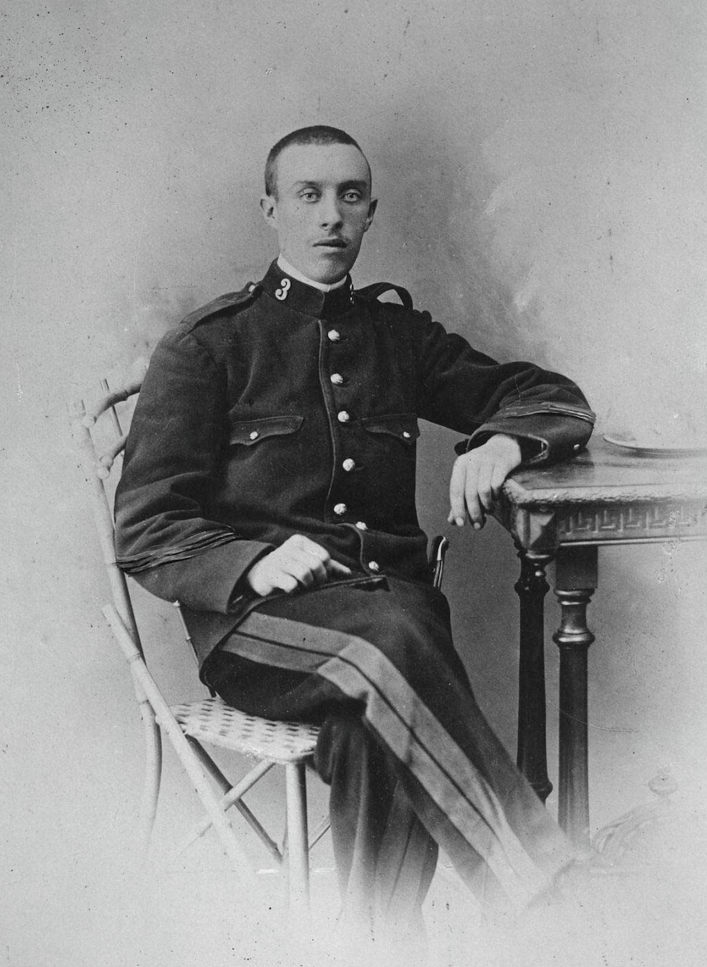 Retrato fotográfico del cabo Noval.